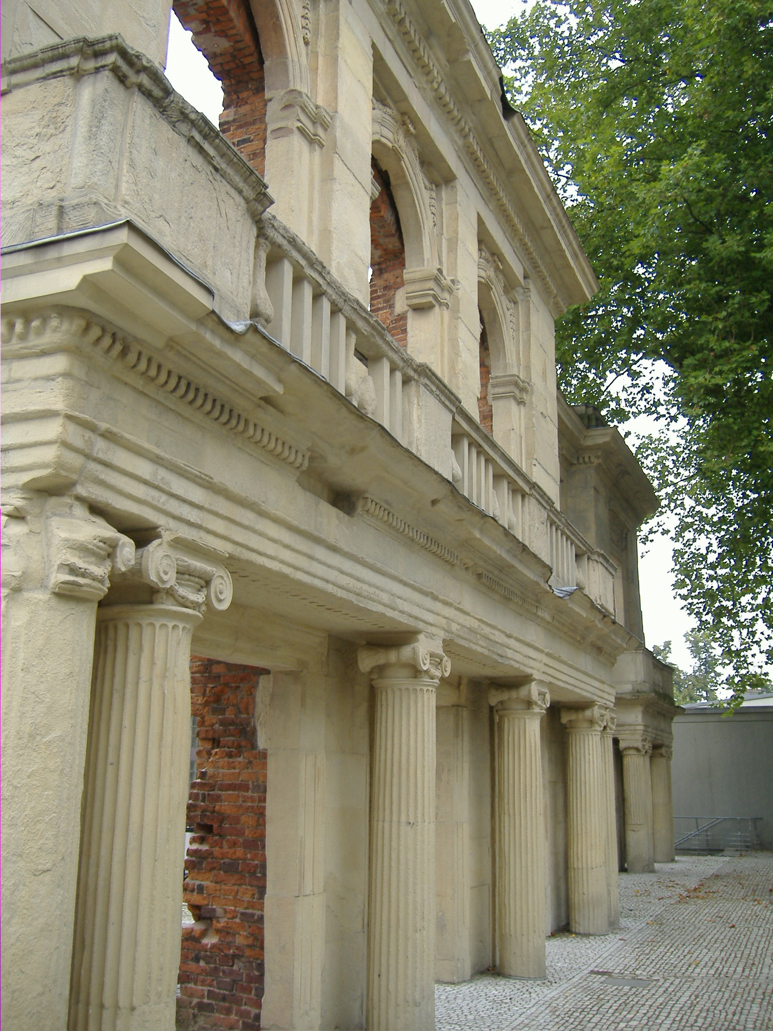 Die Städtischen Bühnen Münster sind das Theater der westfälischen Hauptstadt Münster. Ruinen. Tag des offenen Denkmals, Panoramafreiheit Foto: Elkin Fricke --Managementboy 12:40, 16 September 2005 (UTC)